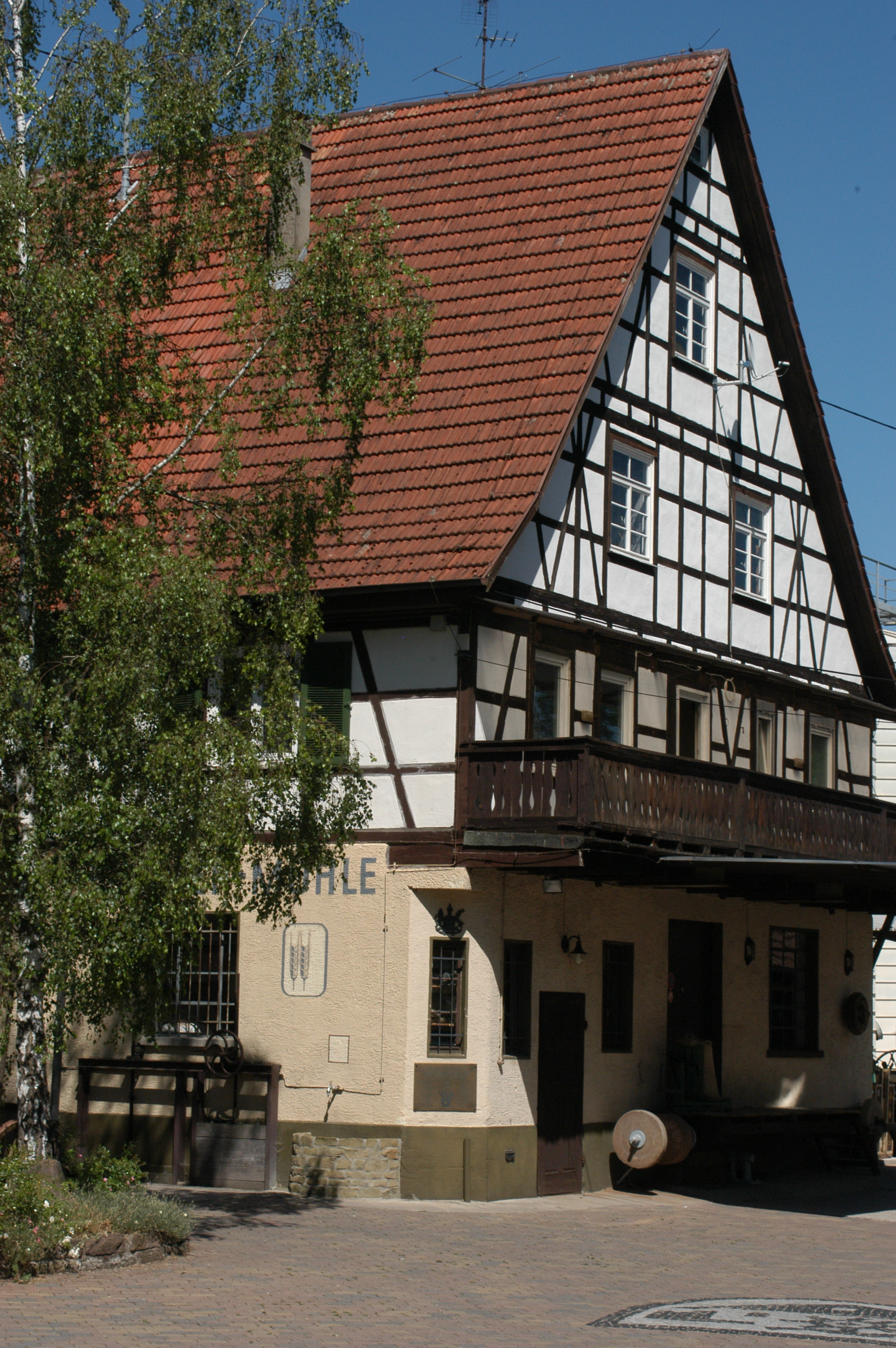 Die Fessler Mühle in Sersheim